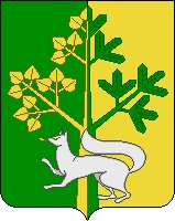 Смешанное лиственно-хвойное дерево символизирует богатство лесами Тавдинского района. Соболь символизирует красоту, скорость, изящество и самостоятельность.